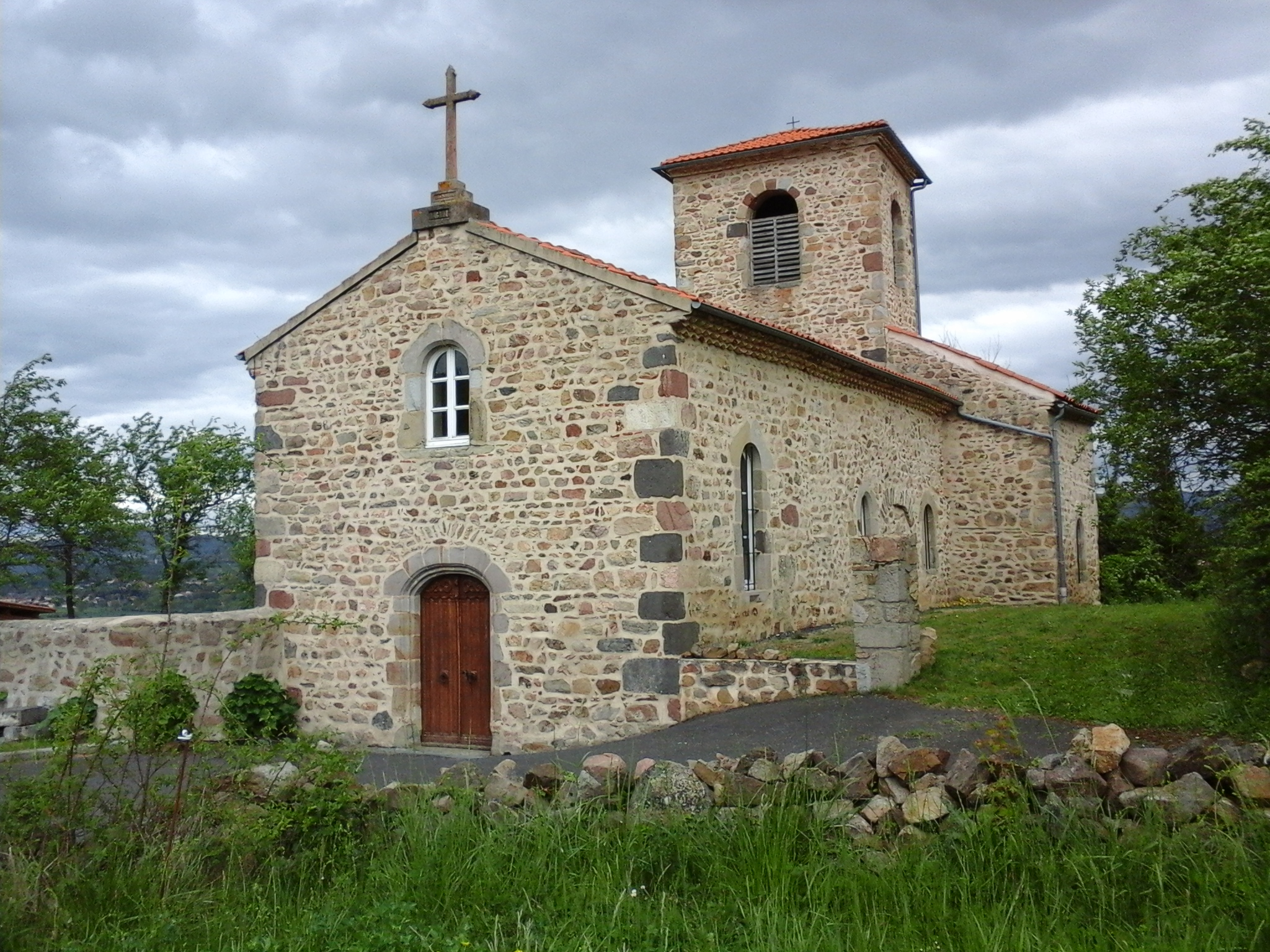 Eglise de St Géron - Haute-Loire France